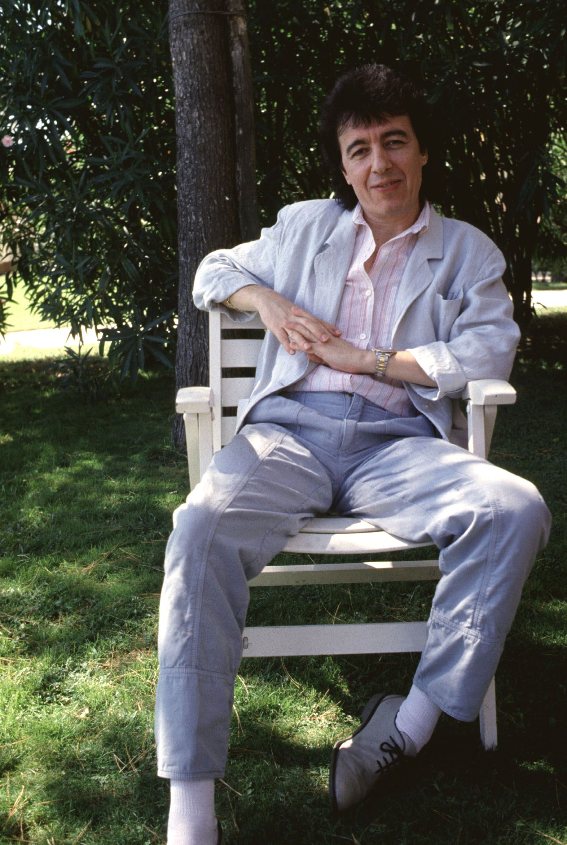 Bill Wyman nel 1989